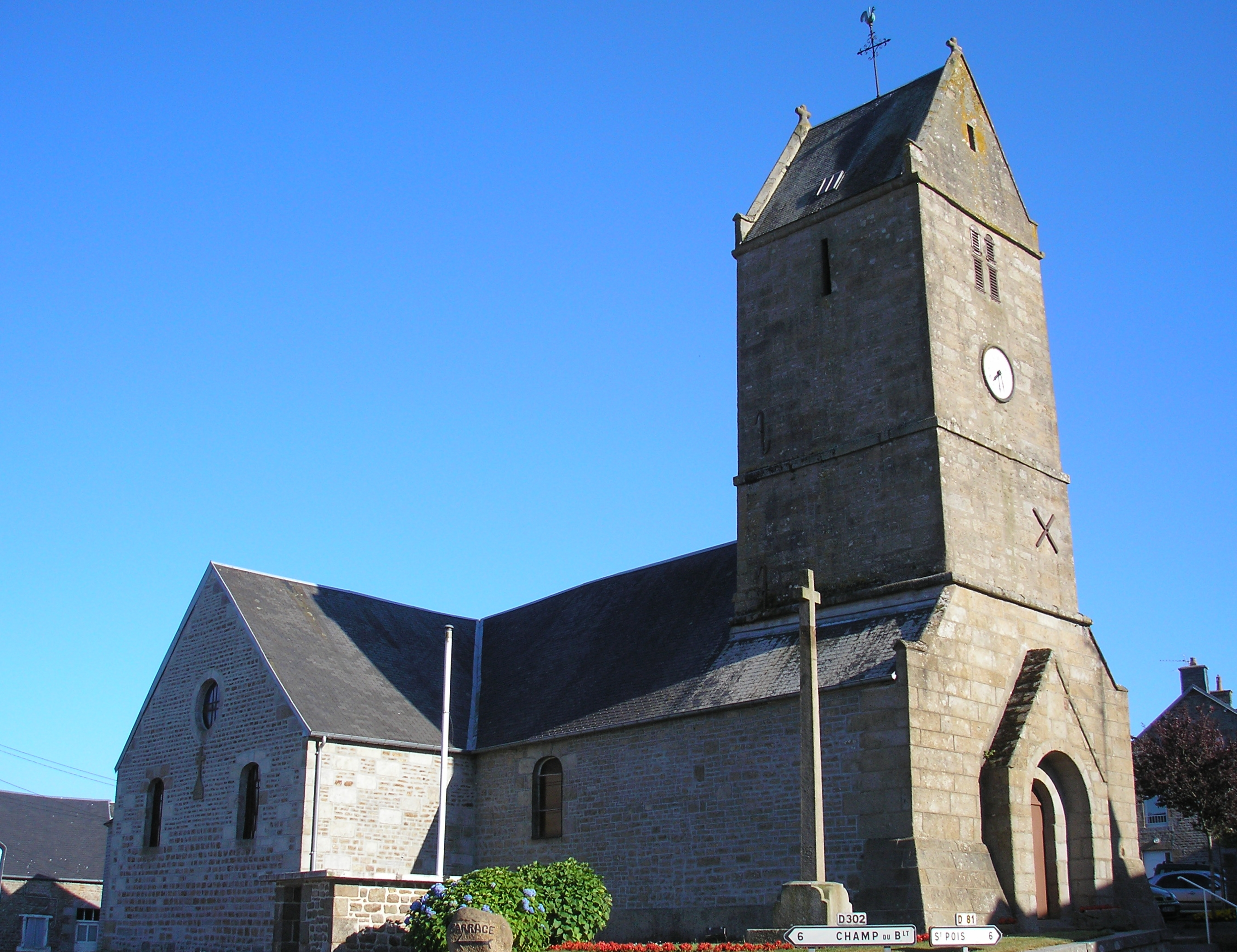 Le Gast (Normandie, France). L'église Saint-Jean-Baptiste.